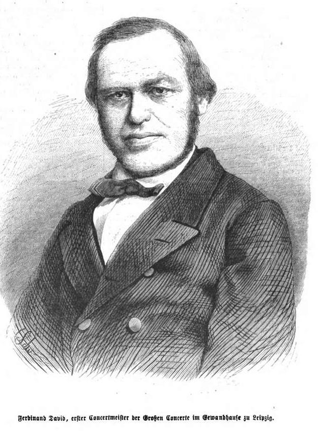 Ferdinand David, erster Konzertmeister im Gewandhaus zu Leipzig, 1868.